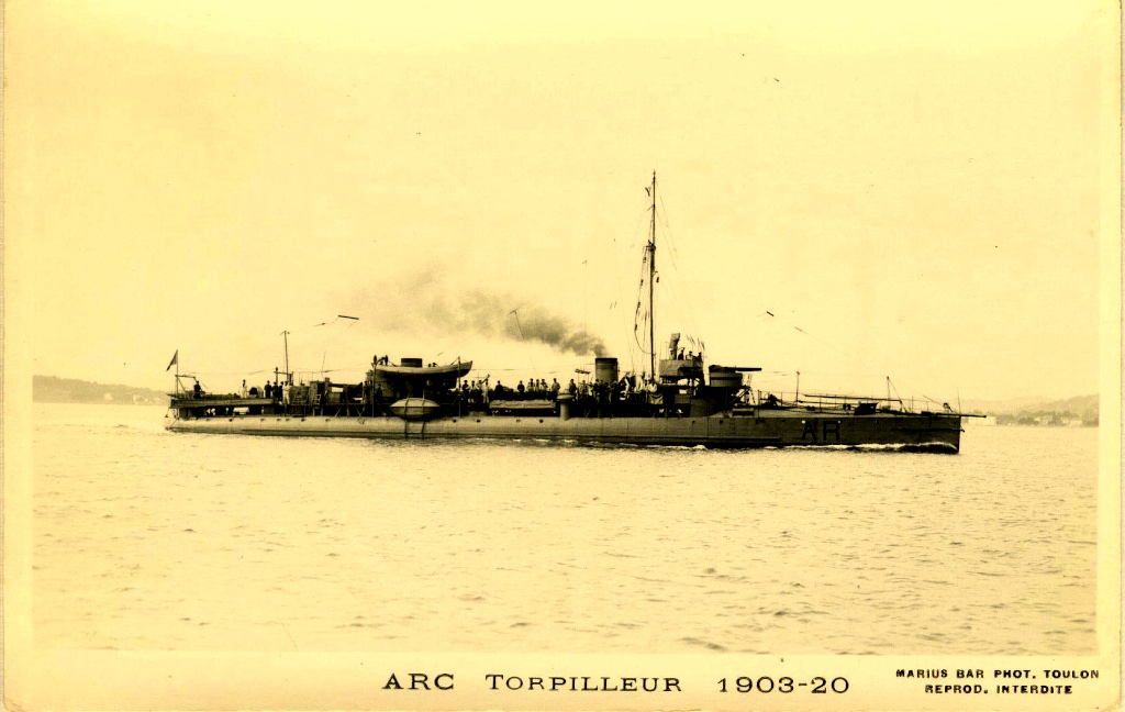 Contre-torpilleur français : Arc (Classe Arquebuse)